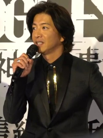 木村拓哉です。